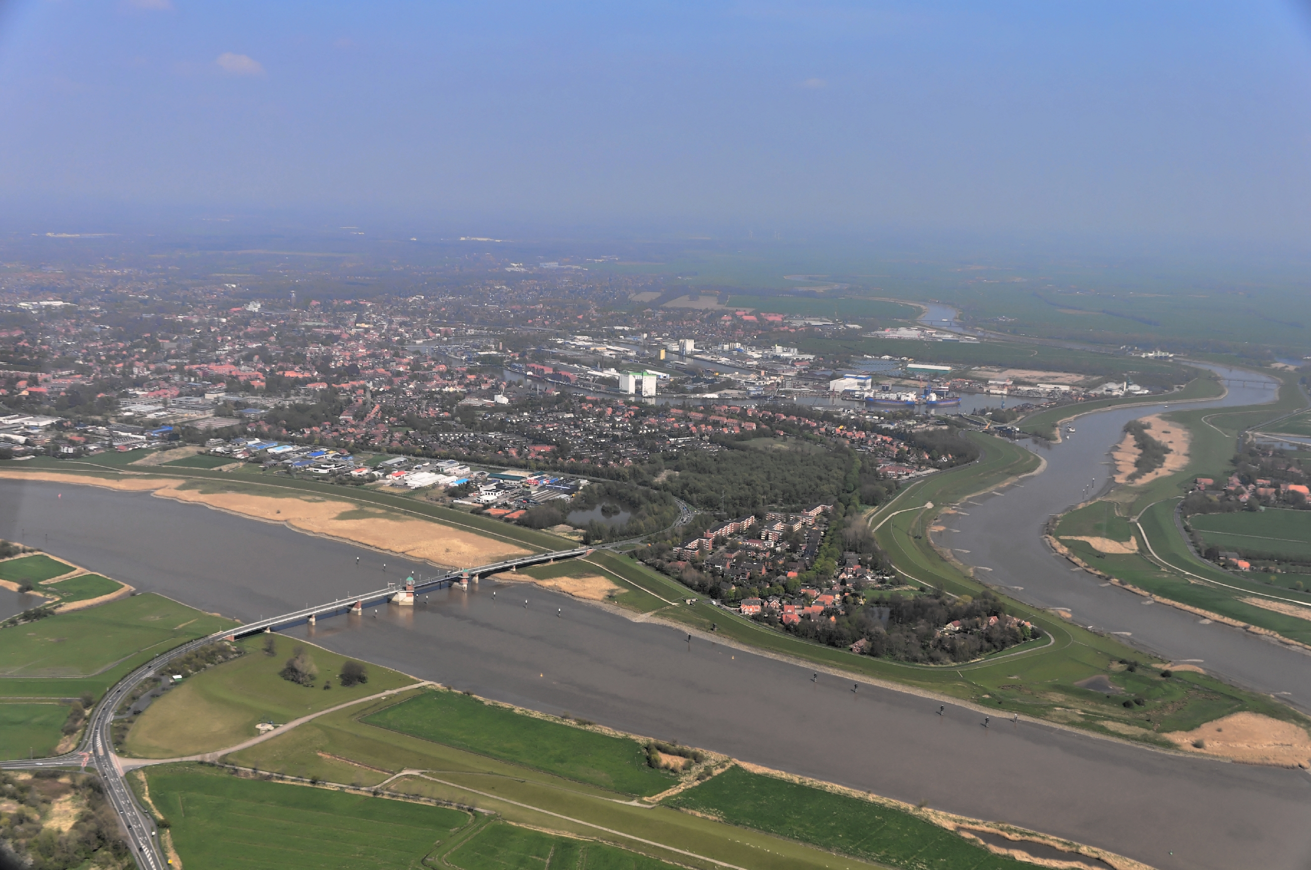 Luftbilder von der Nordseeküste 2013-05